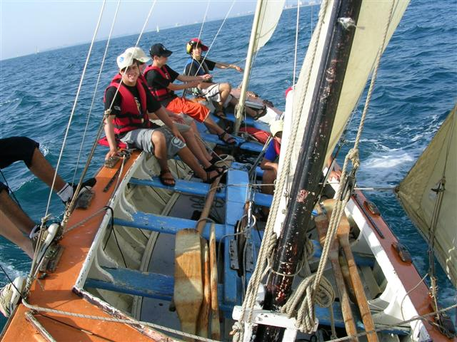 לוויתנית